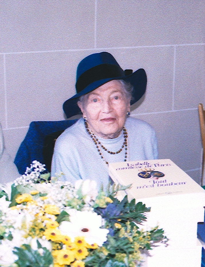 SAR Isabelle d'Orléans et Bragance lors d'une dédicace en Normandie